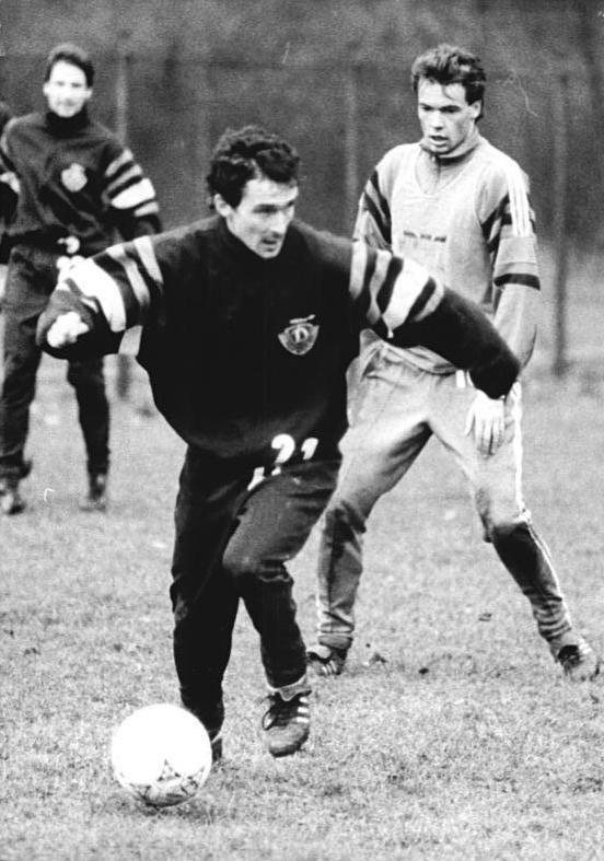 3.12.90 Dresden: Die Fußball-Oberliga hat zwar Winterpause, aber auf den Trainingsplätzen herrscht Betrieb. Beim 1. FC Dynamo Dresden dreht der Neuzugang Uwe Roesler seine Runden im neuen Dress (r.). Vorn: Hans-Uwe Pilz. ADN-Matthias Hiekel